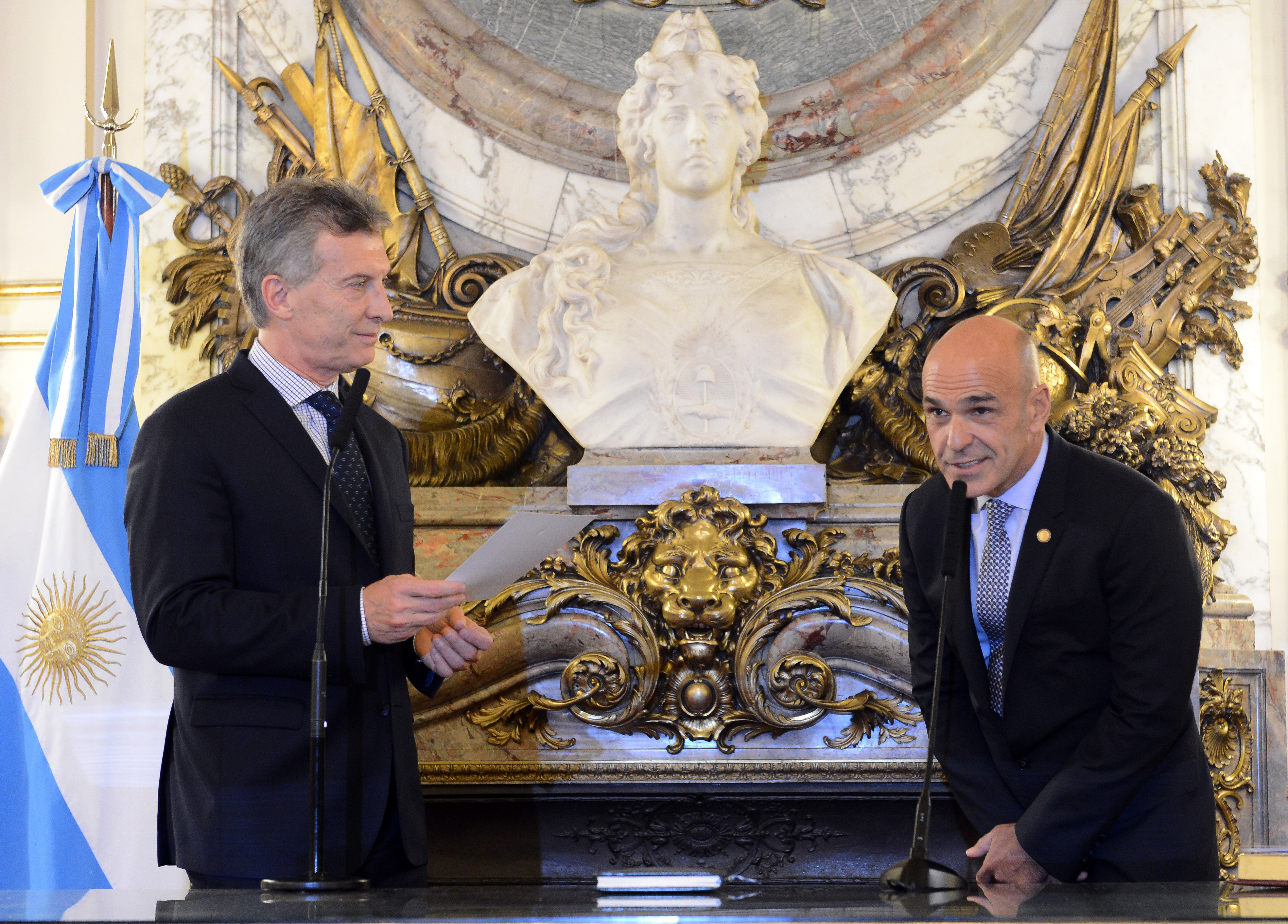 Macri tomando juramento a Gustavo Arribas, titular de la AFI.